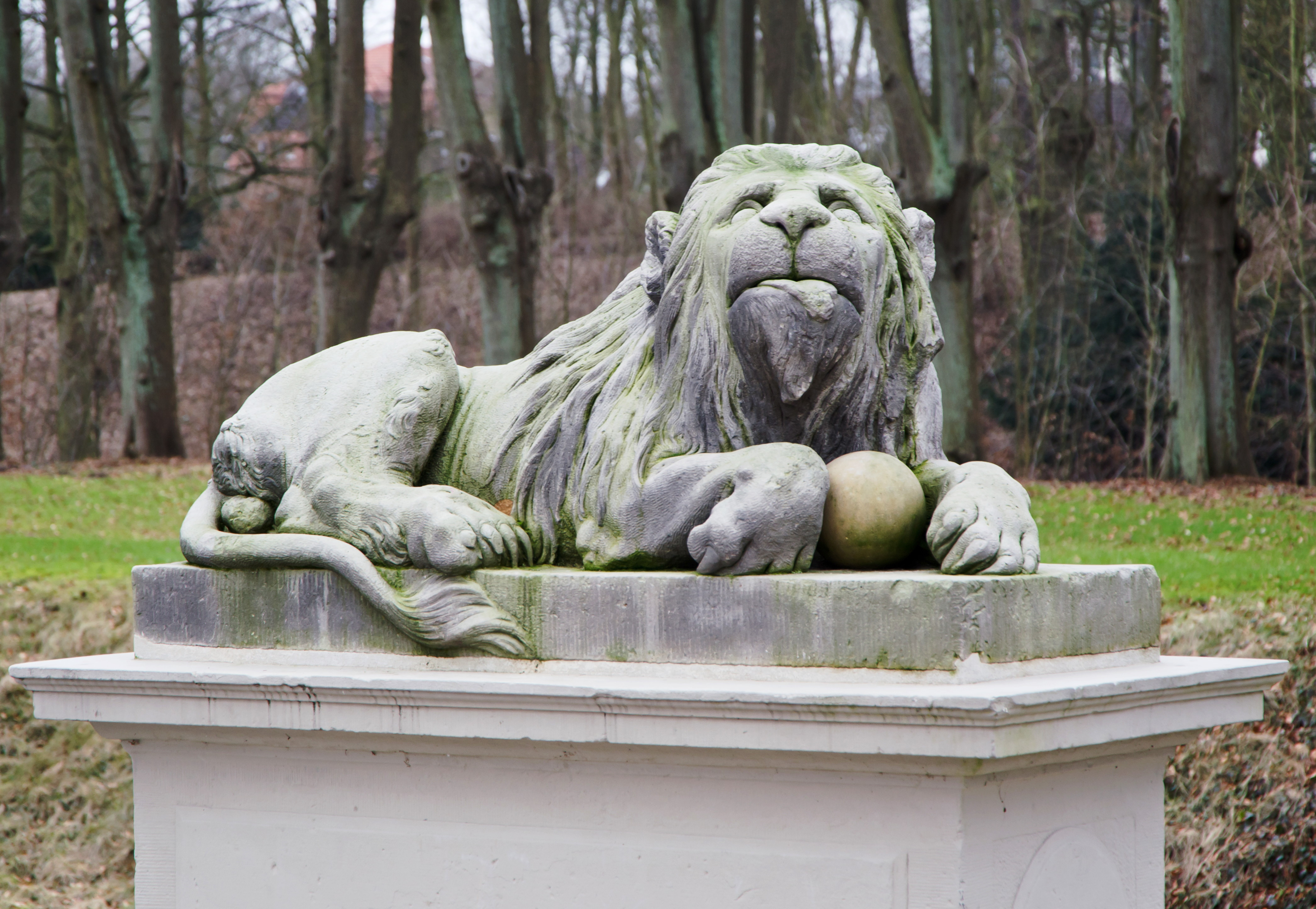 Schloss Ahrensburg - Löwe, geschaffen von Johann Christoph Ludwig Lücke